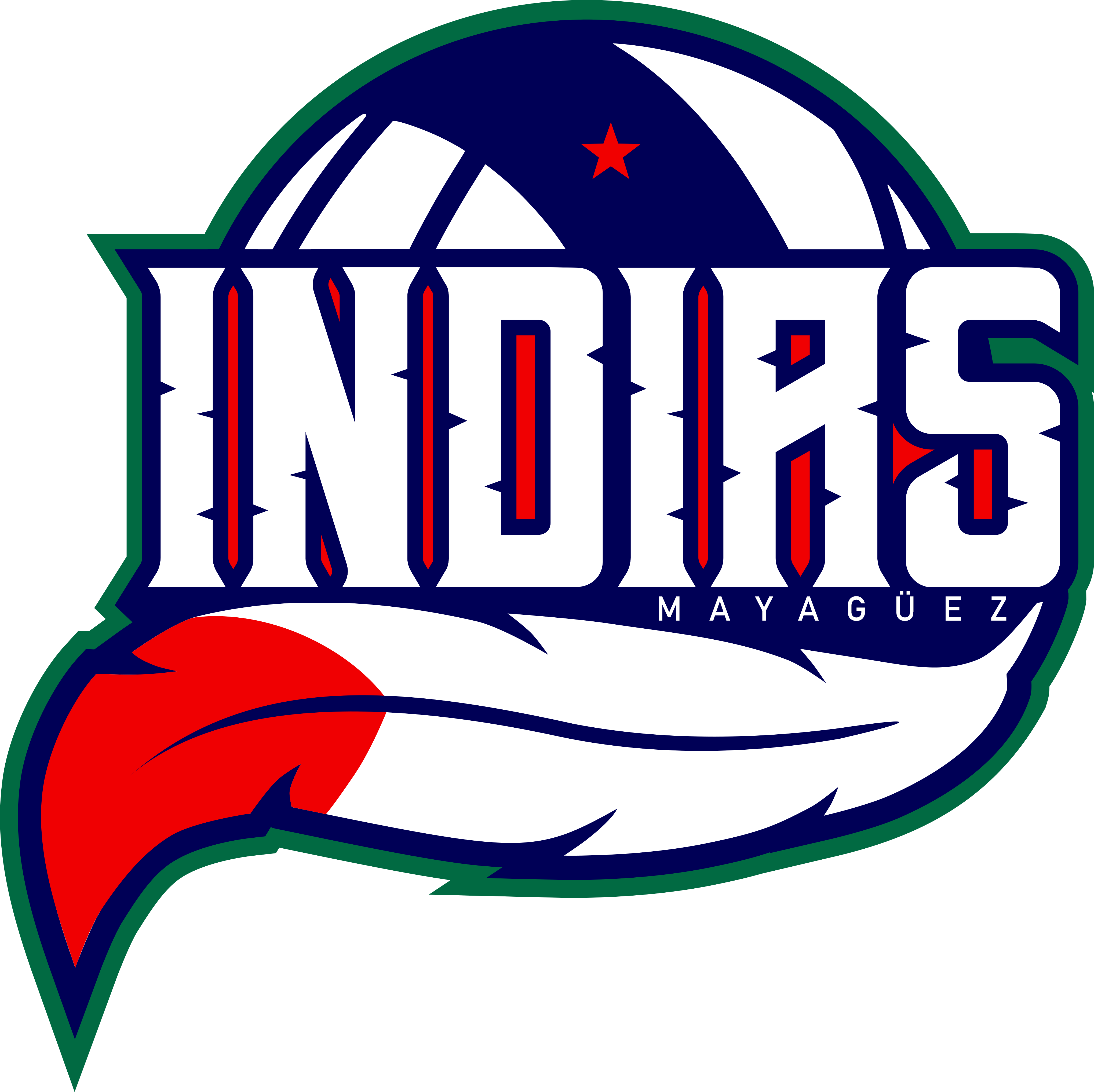 Logo oficial de las Indias de Mayagüez